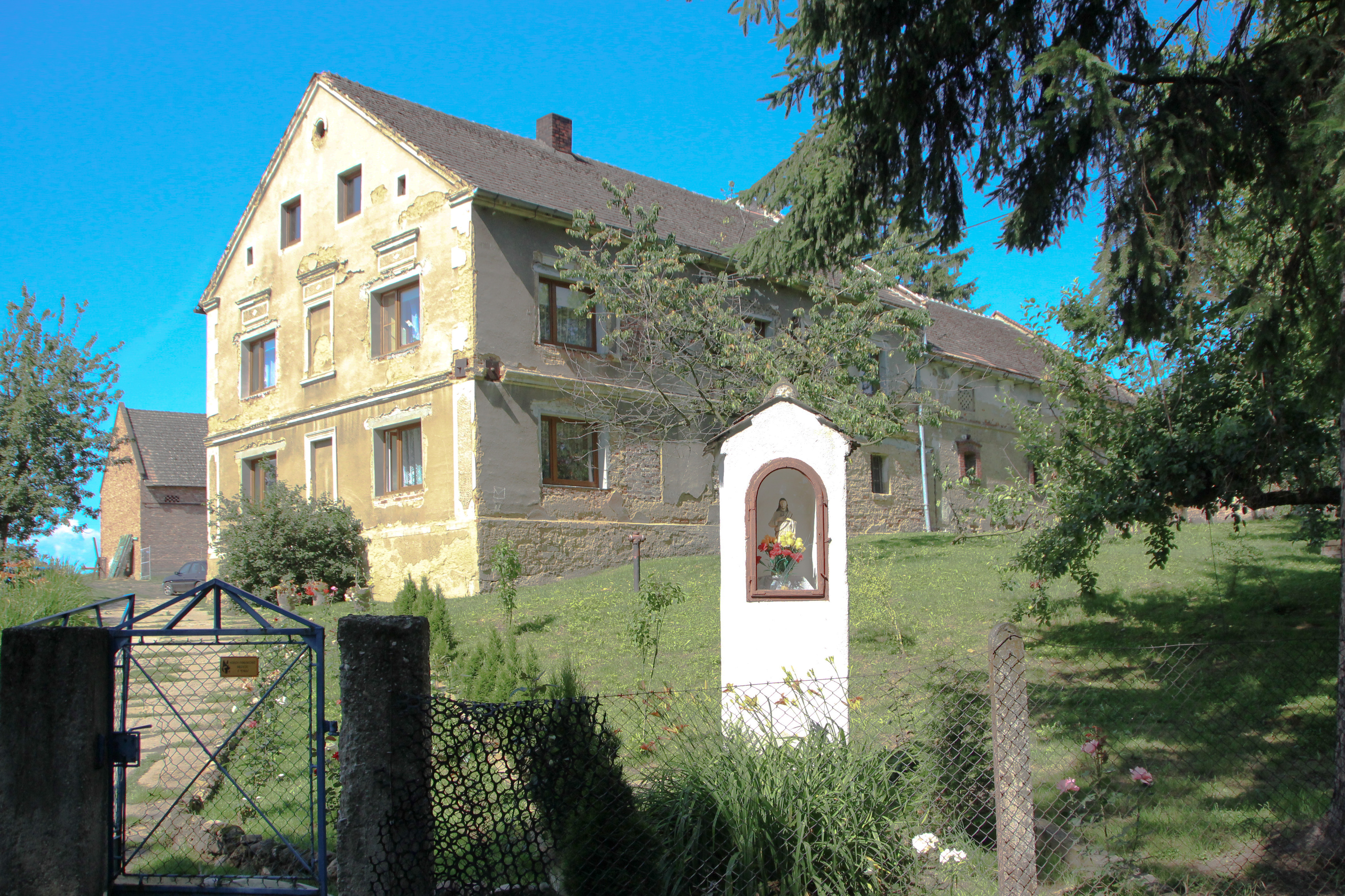 Stary Las - wieś w Polsce w opolskim, w powiecie nyskim, w gminie Nysa.